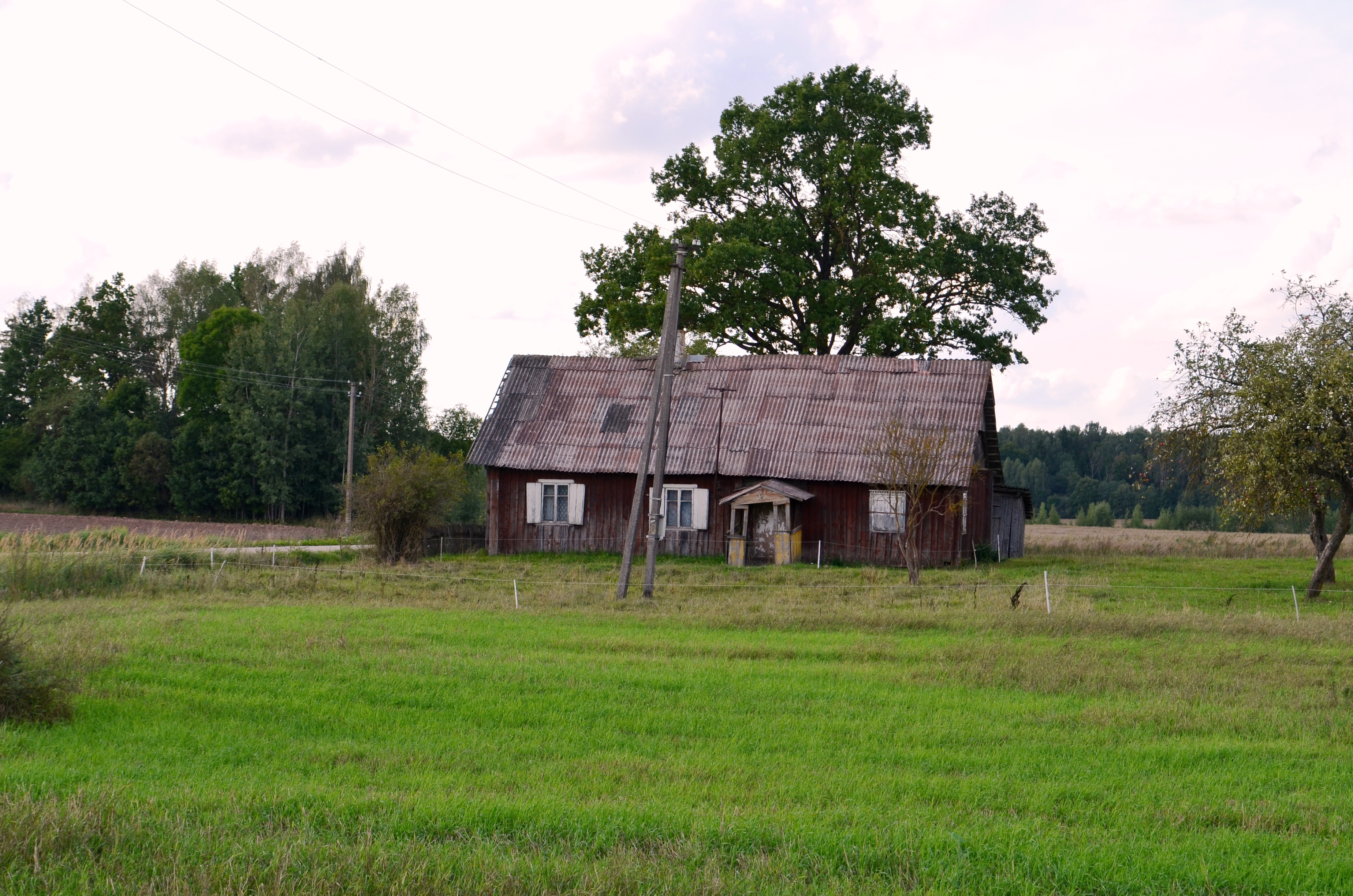 Legečiai, Radviliškio raj.